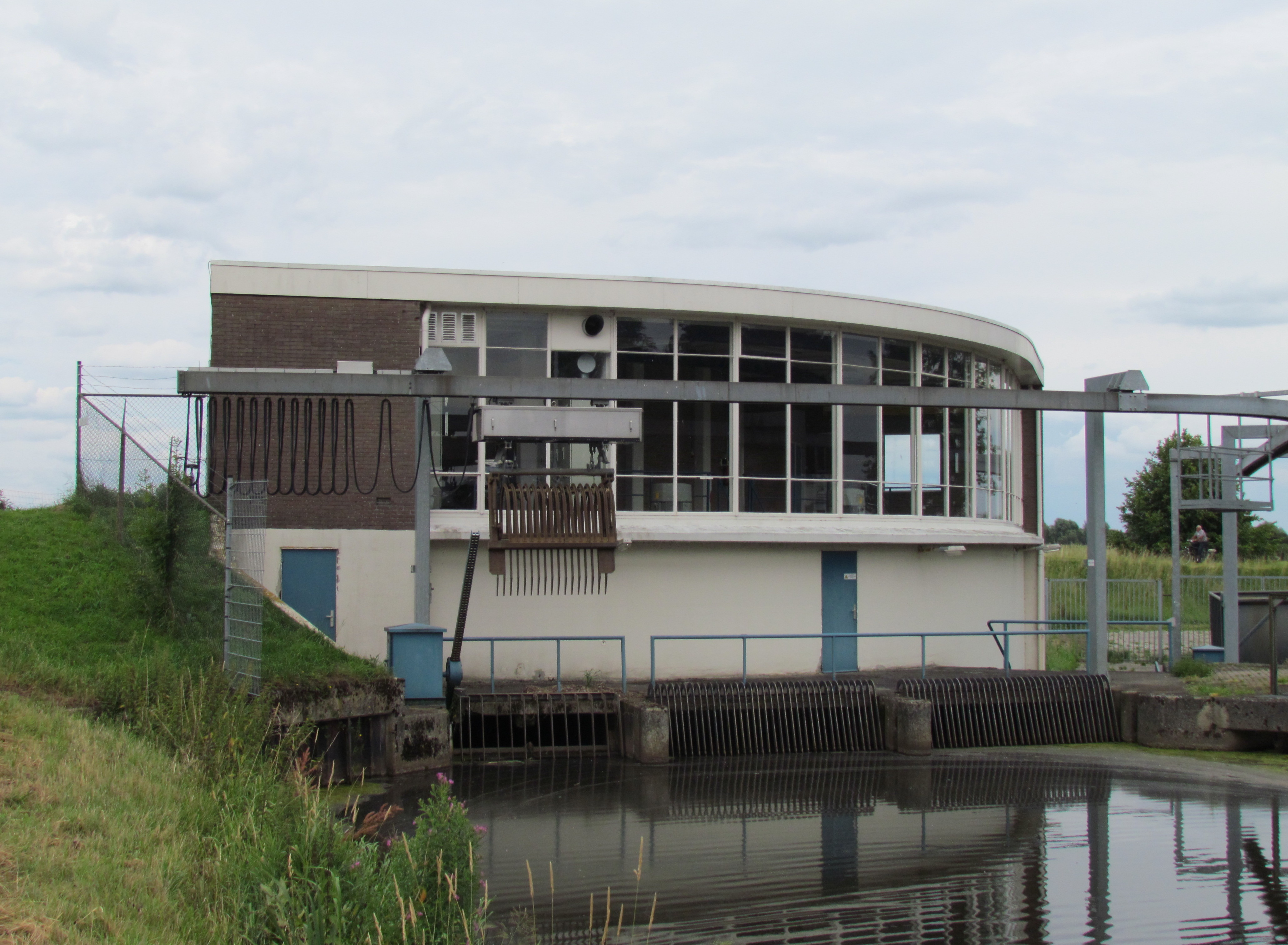 Gemaal mr. L.A.S.J. Baron van der Feltz (Middelbeek) in de Voorsterbeek bij Voorst, Gelderland, NL